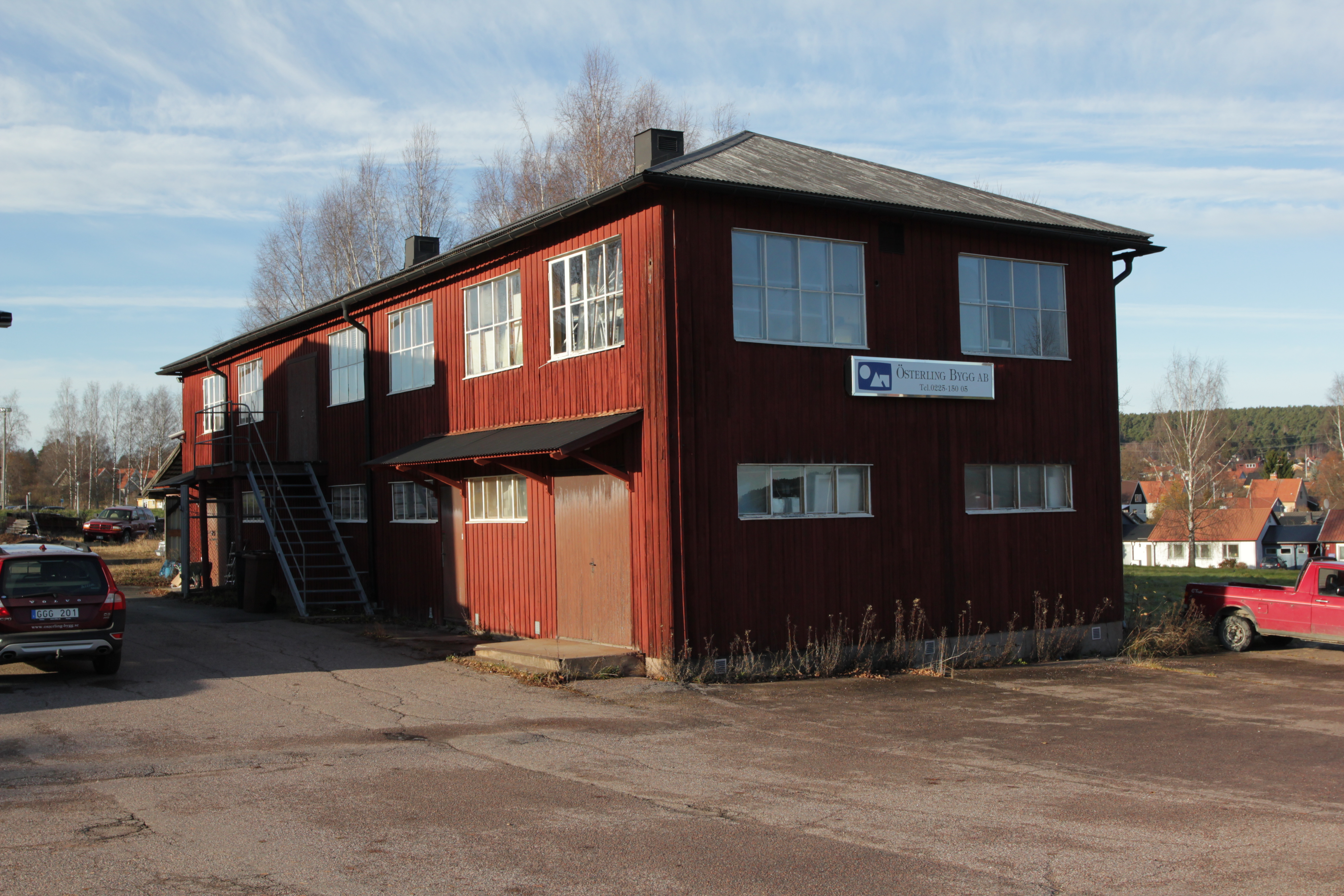 Kvarvarande byggnad av Alvar Aaltos möbel- och köksinredningsfabrik Artek, Hedemora, Sverige.